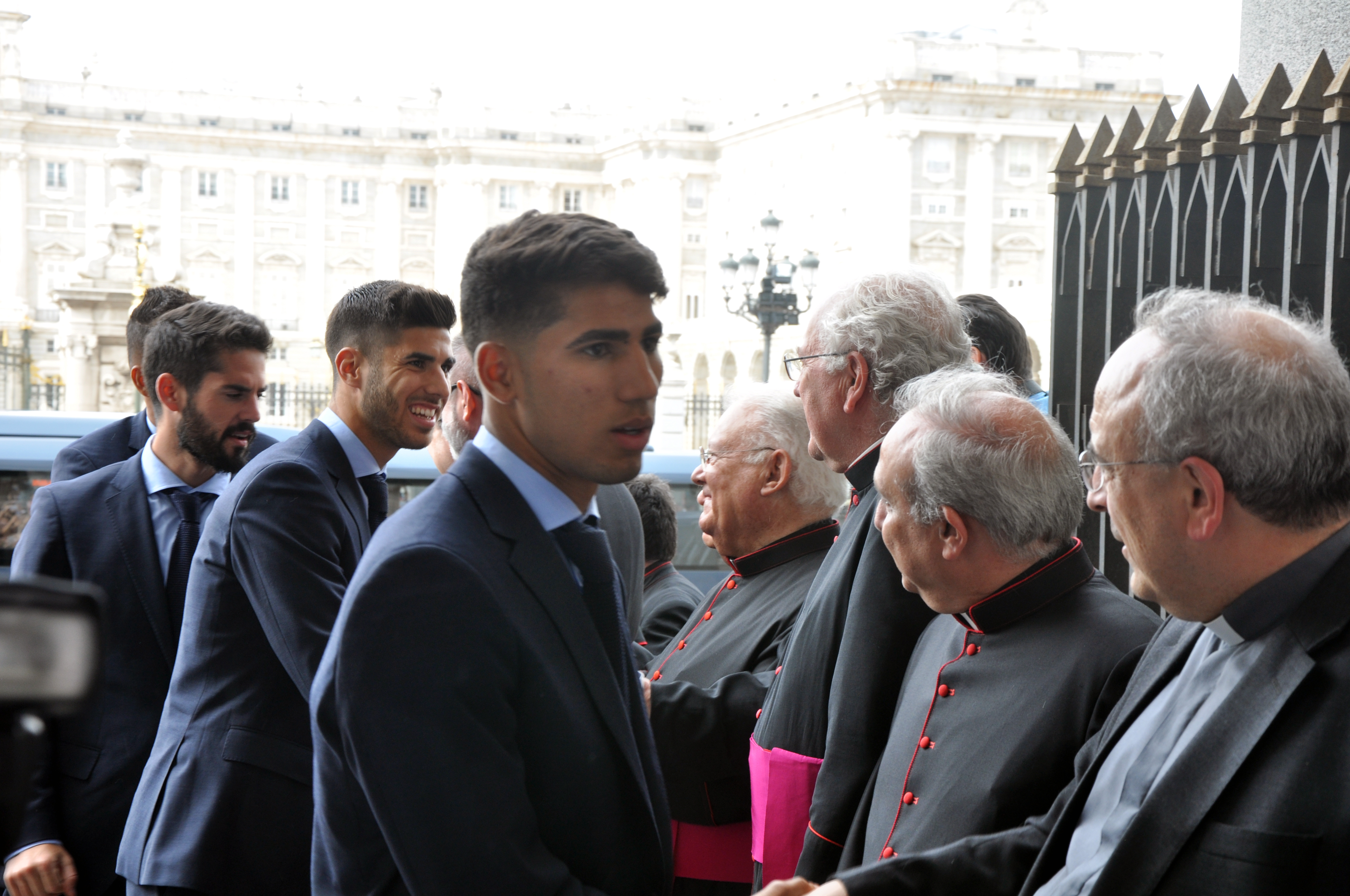 El Real Madrid ofrece la Champions a la Virgen de la Almudena. Créditos: archimadrid / José Luis Bonaño.